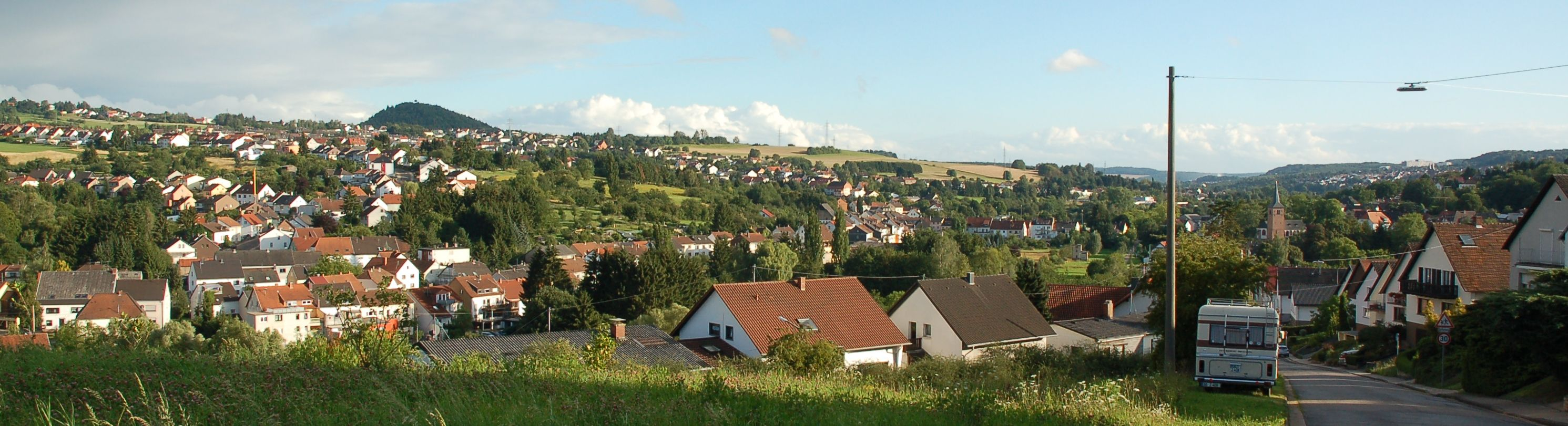 Blick vom Kyllberg in Herchenbach nach Süden ins untere Köllertal; rechts oben: die Knappschaftsklinik oberhalb von Püttlingen; in der linken Bildhälfte, über den Häusern von Köllerbach: die Bergehalde der ehemaligen Grube Viktoria